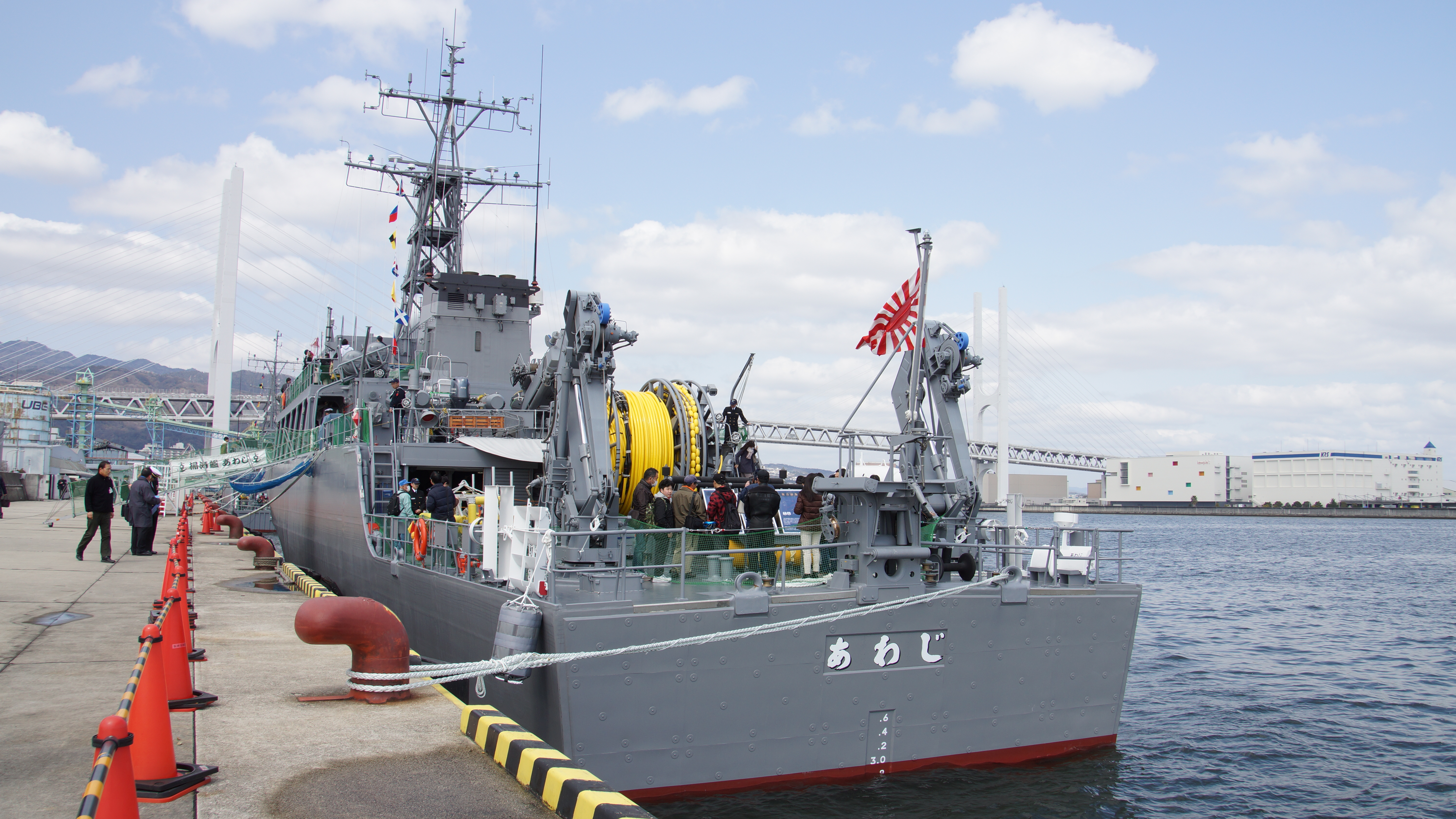 海上自衛隊 掃海艦あわじ（MSO-304） 左舷後部。2017年4月1日 阪神基地にて。